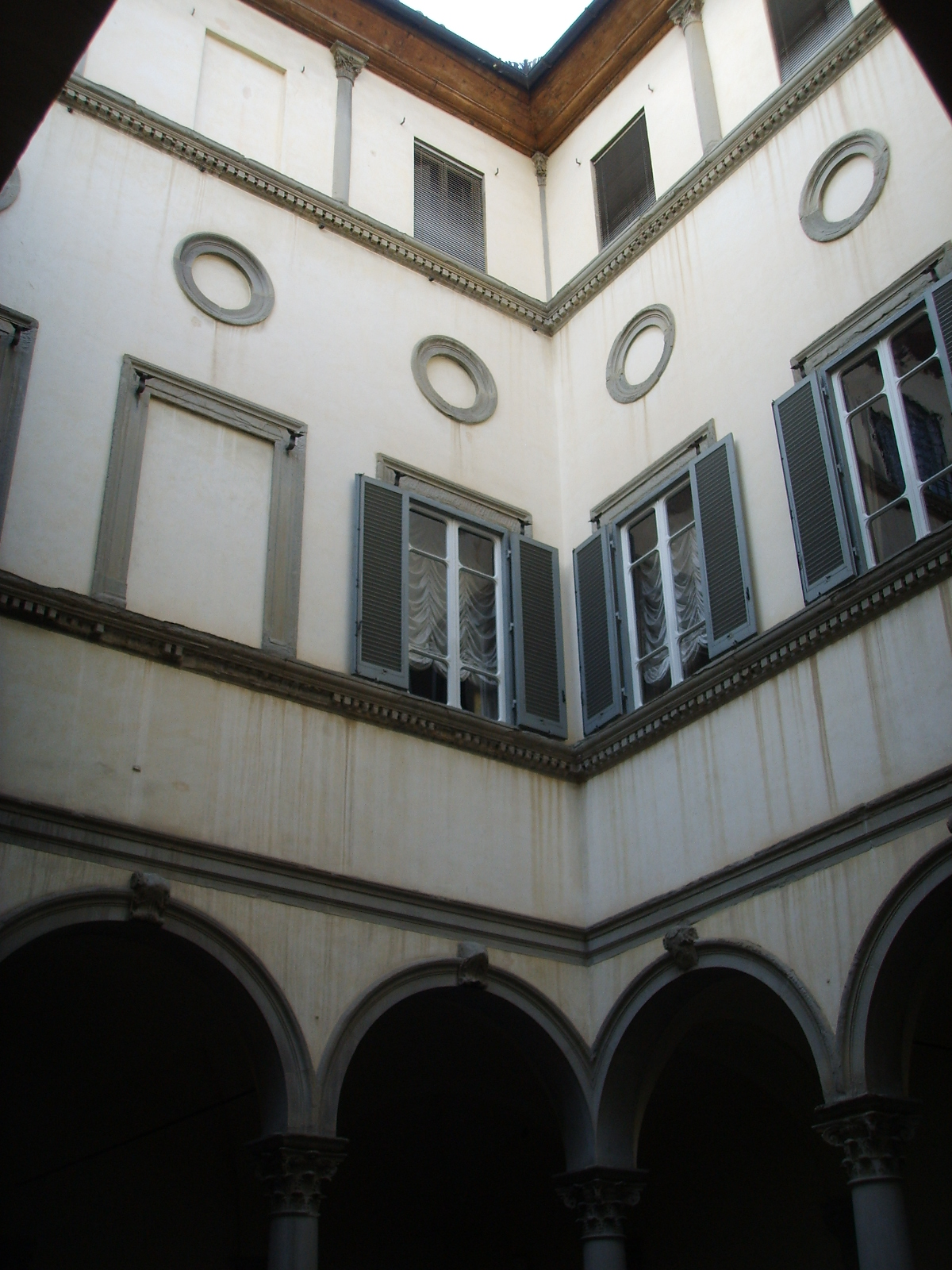 Palazzo ricasoli firidolfi, cortile